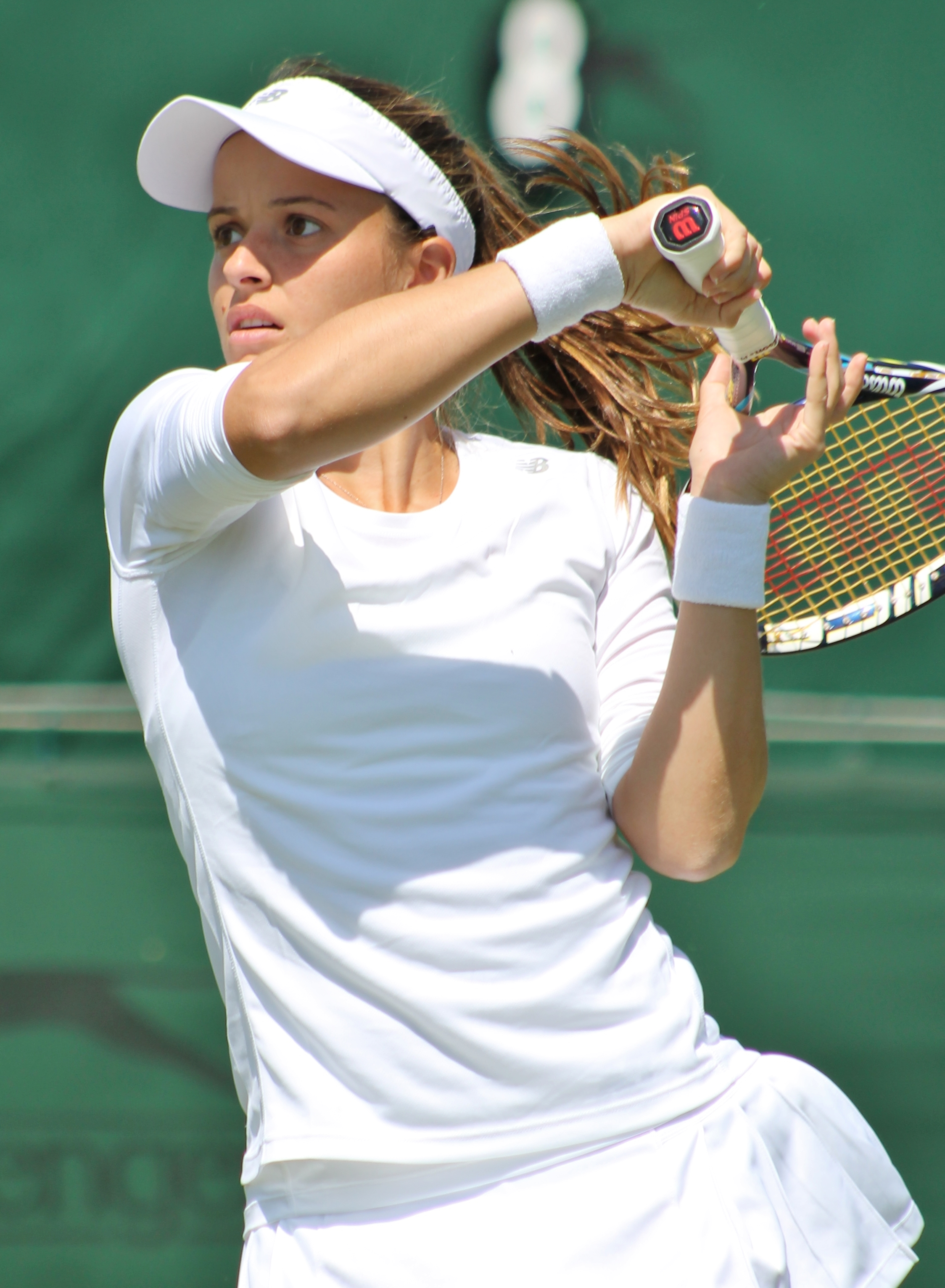 Gibbs WMQ14 (4)